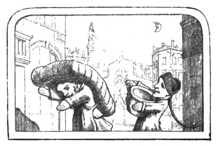 Le déménagement.